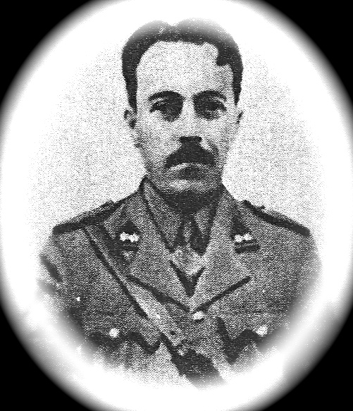 Mtr.Max Temmerman, verzetsstrijder.